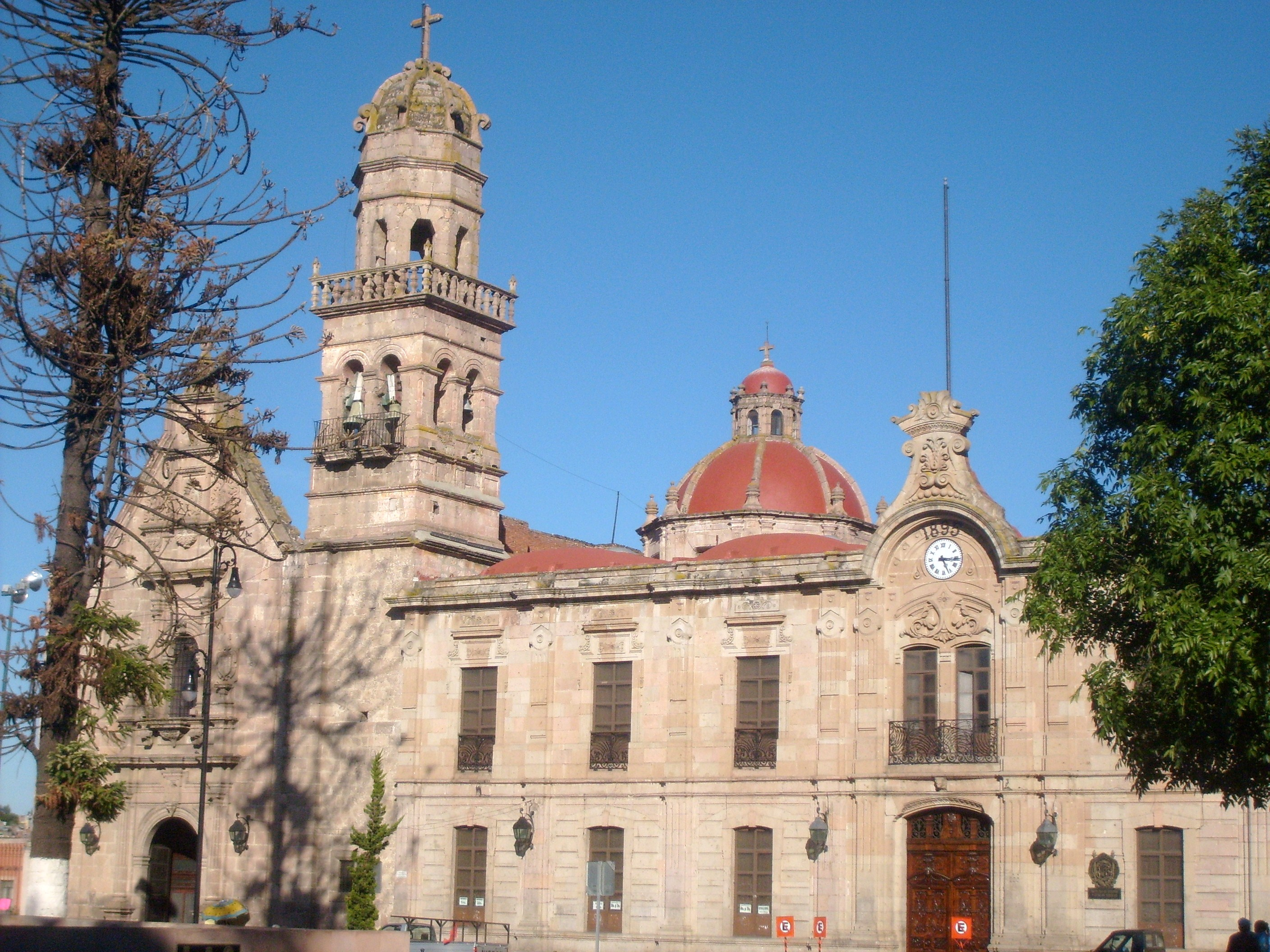 la universidad michoacana ocupa los templos y palacios para sus facultades.